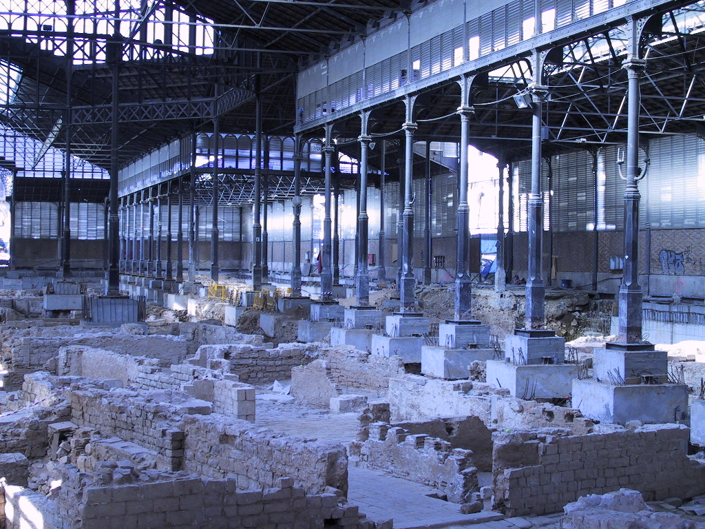 Interior del Born, bases de les columnes, i detall de les excavacions de les restes de la ciutat prèvia a 1714